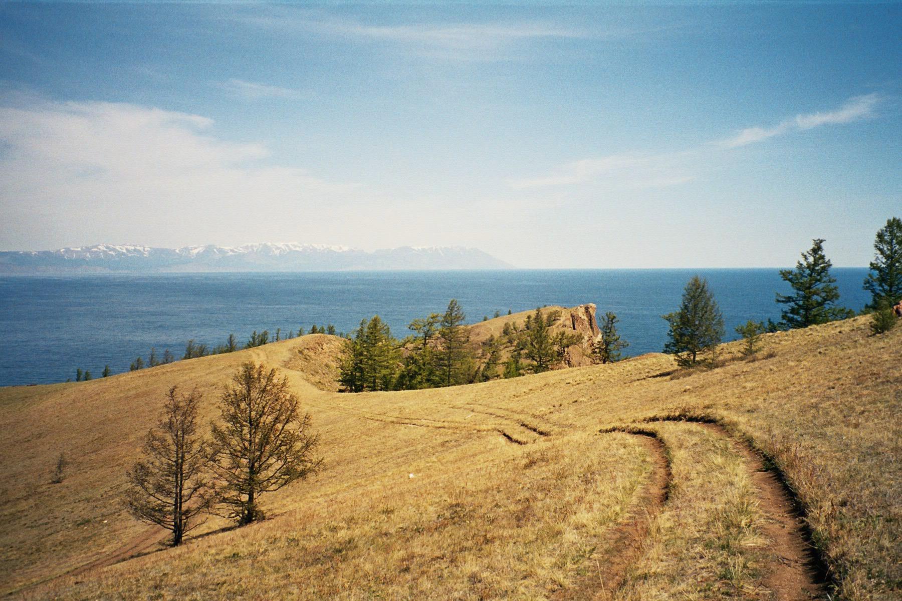 Nordspitze der Insel Olchon, Baikalsee, Russland, North Point of Olchon Island, Lake Baikal, Russia